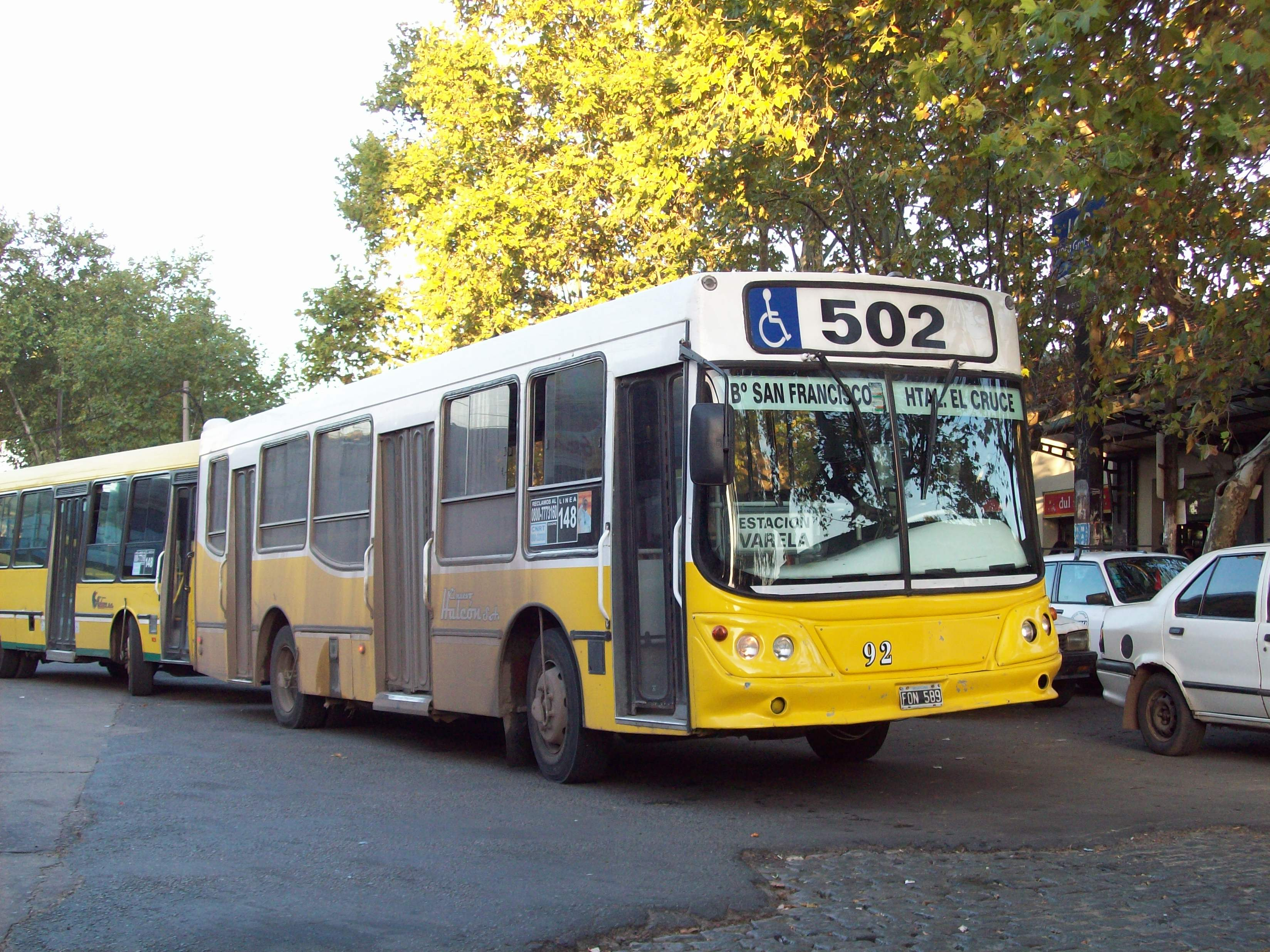 Colectivo de la línea 502 (operada por El Nuevo Halcón SA) en estación Florencio Varela.